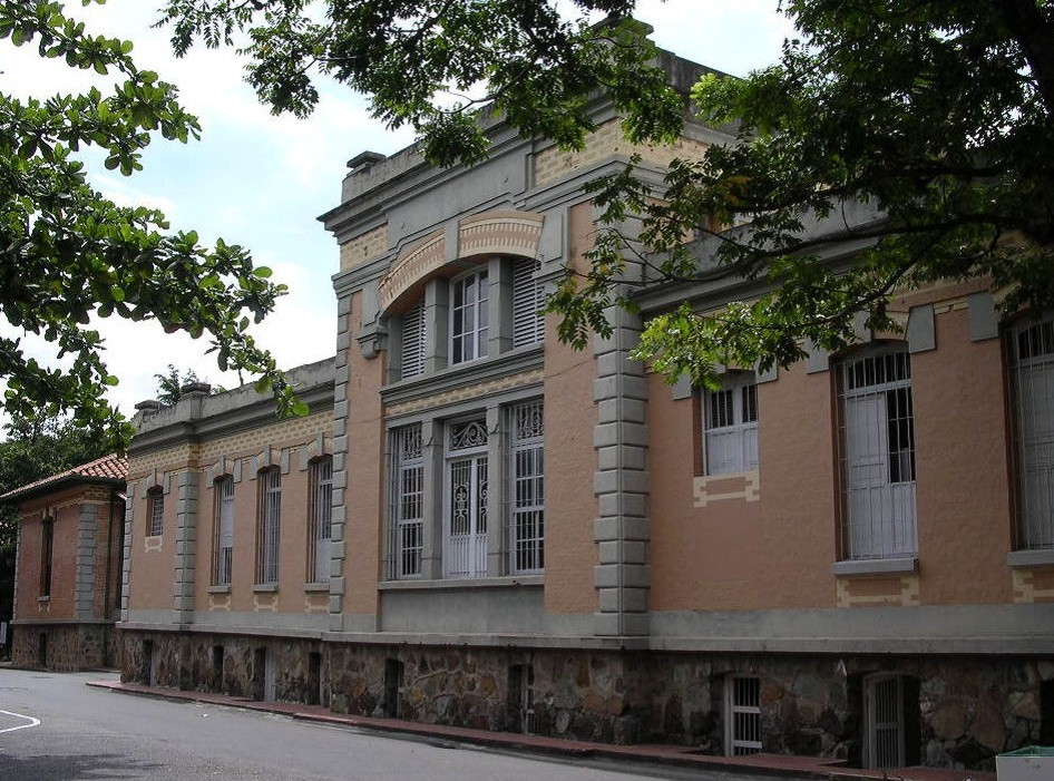 Hospital Universitario San Vicente de Paúl. Medellín, Colombia